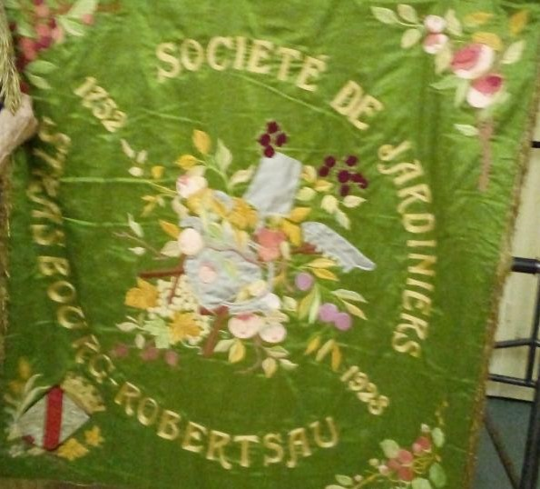 Drapeau de la confrérie Saint-Fiacre de la Robertsau (Strasbourg) crée en 1752. Il représente les jardiniers et maraîchers de Strasbourg.